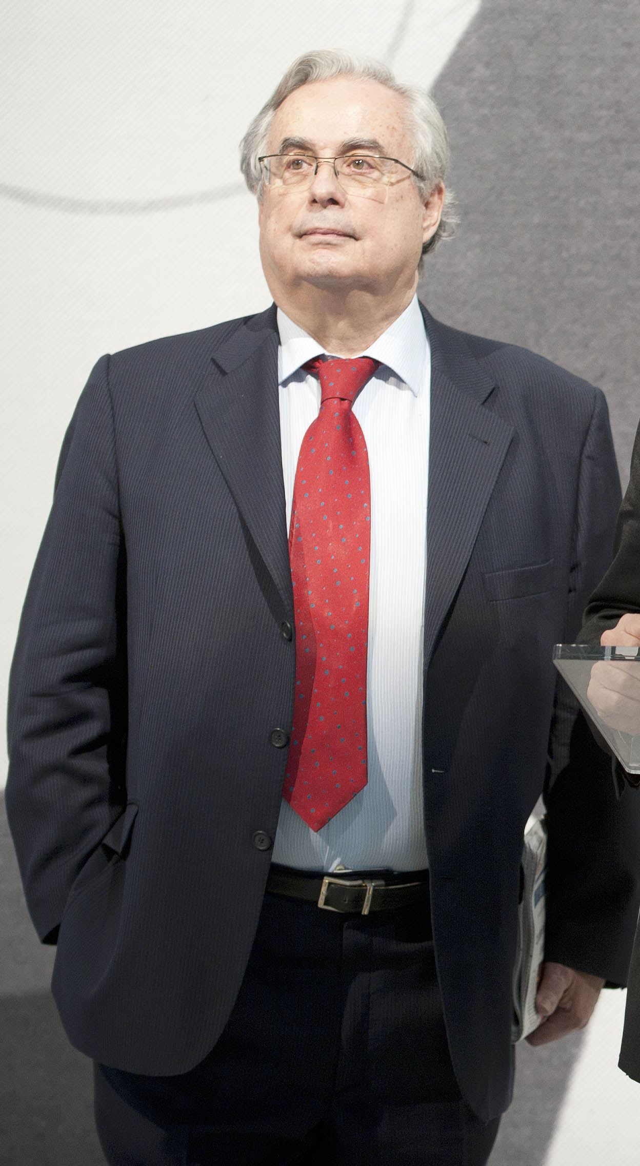 Alonso Puerta, presidente de la Fundación Indalecio Prieto, en la presentación de la exposición 'Indalecio Prieto en la política vasca, 1883-1962'.